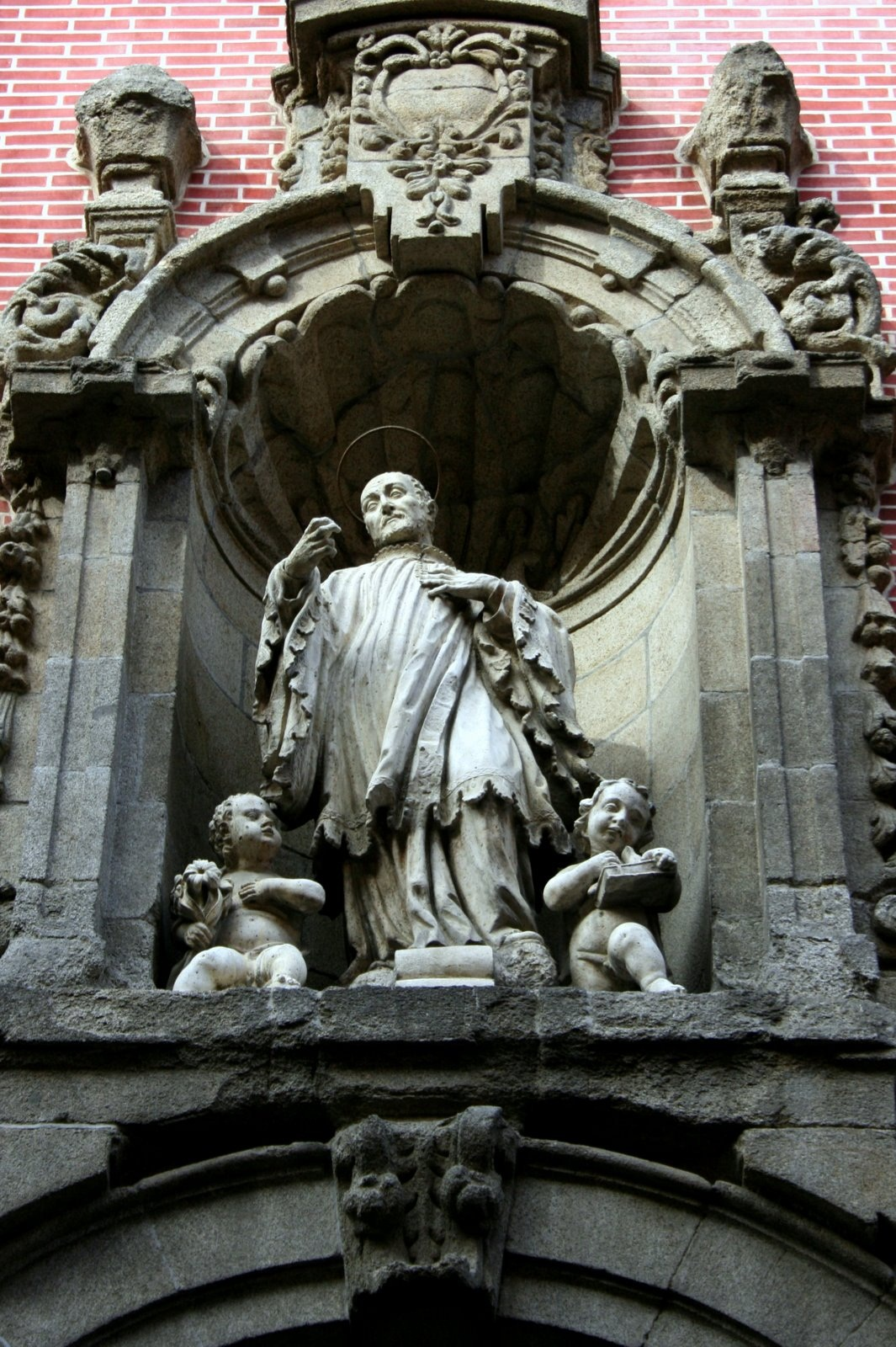 Fachada de la iglesia de San Cayetano de Madrid; escultura de San Andrés Abelino por Pedro Alonso de los Ríos, s. XVIII.